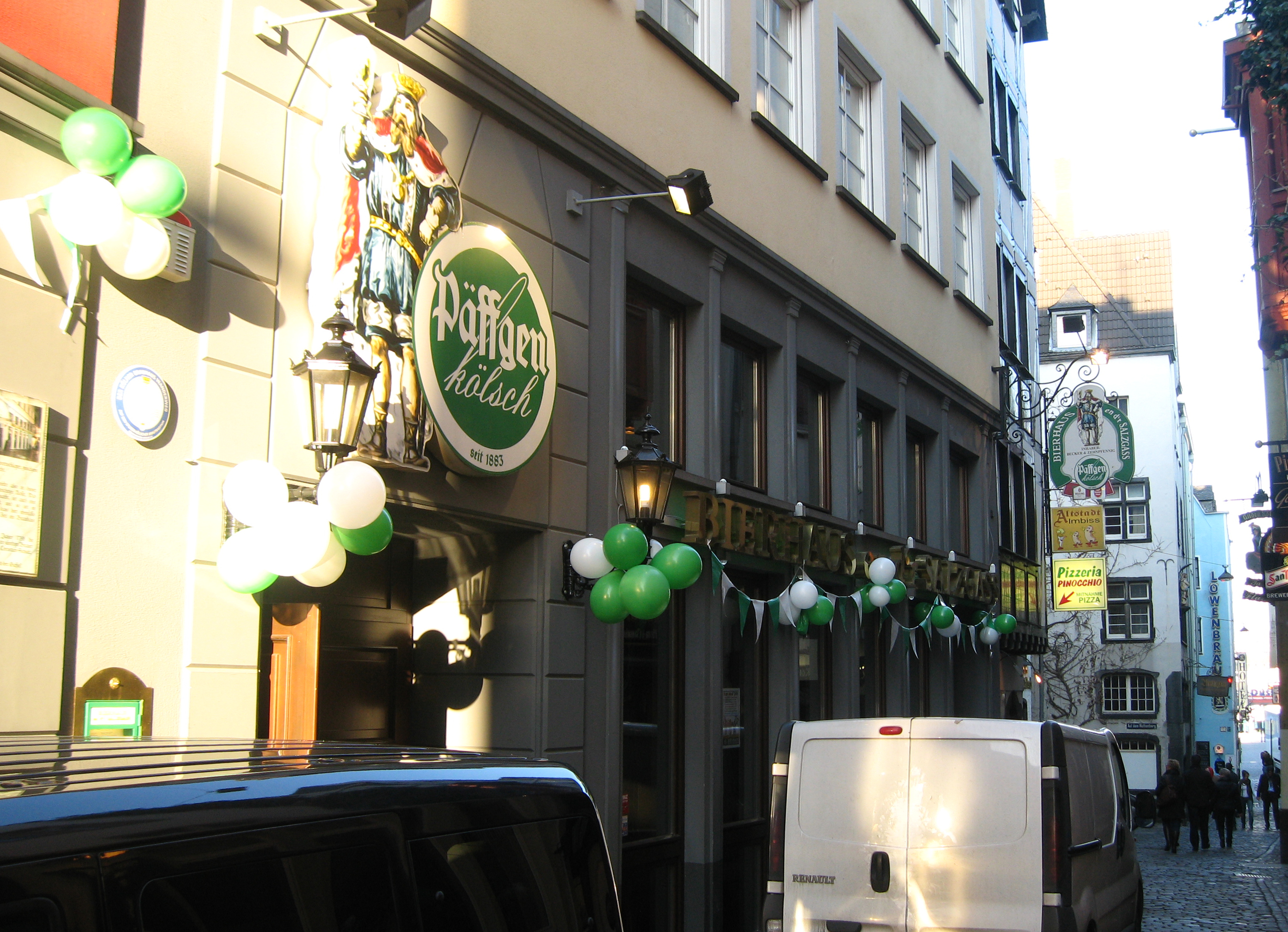 Bierhaus en d'r Salzgass, Frontansicht (Köln, Altstadt) Datum: 02.03.2011 Urheber M. Pfeiffer alias Benutzer:Gordito1869 Quelle: privates Fotoarchiv des Urhebers